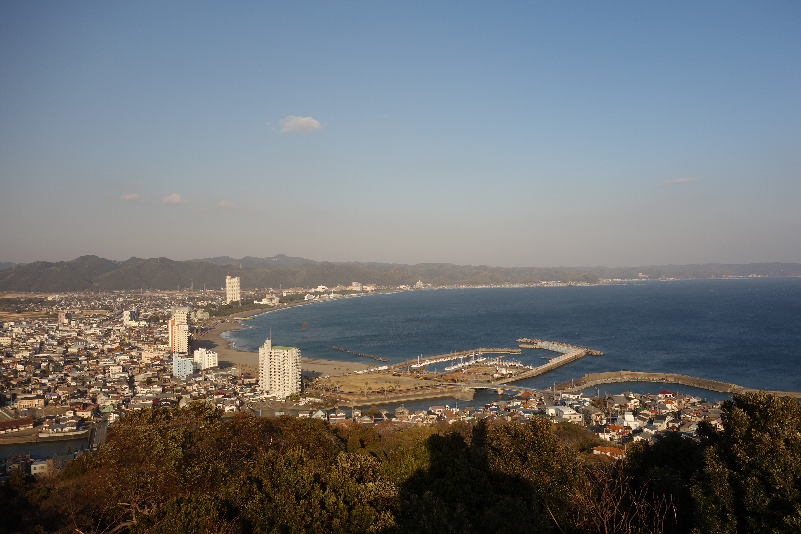 鴨川市街地